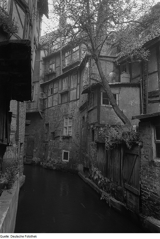 Original image description from the Deutsche Fotothek Quedlinburg. Fachwerkhäuser an einem Bach